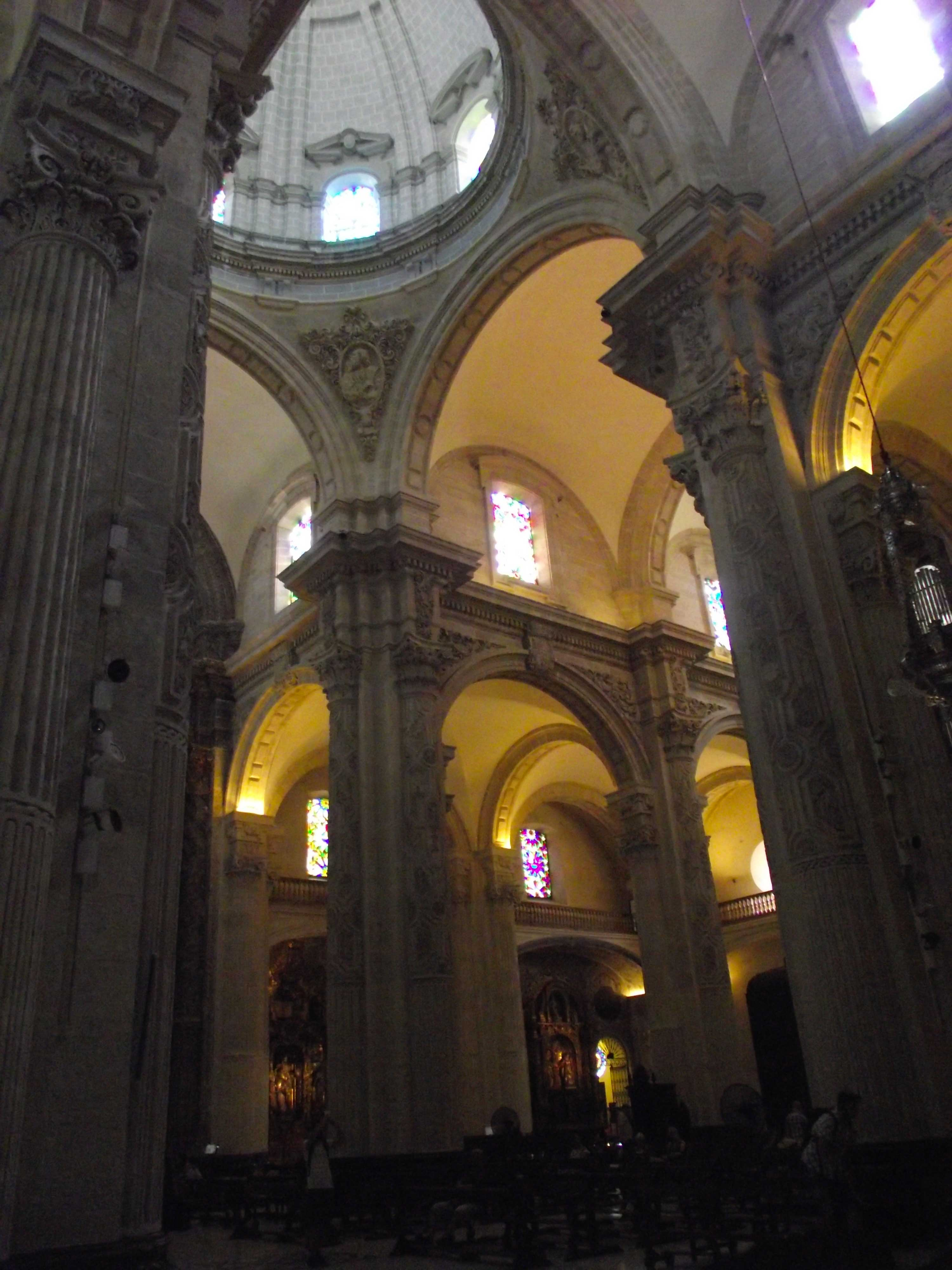 Sevilla, Iglesia del Divin salvador